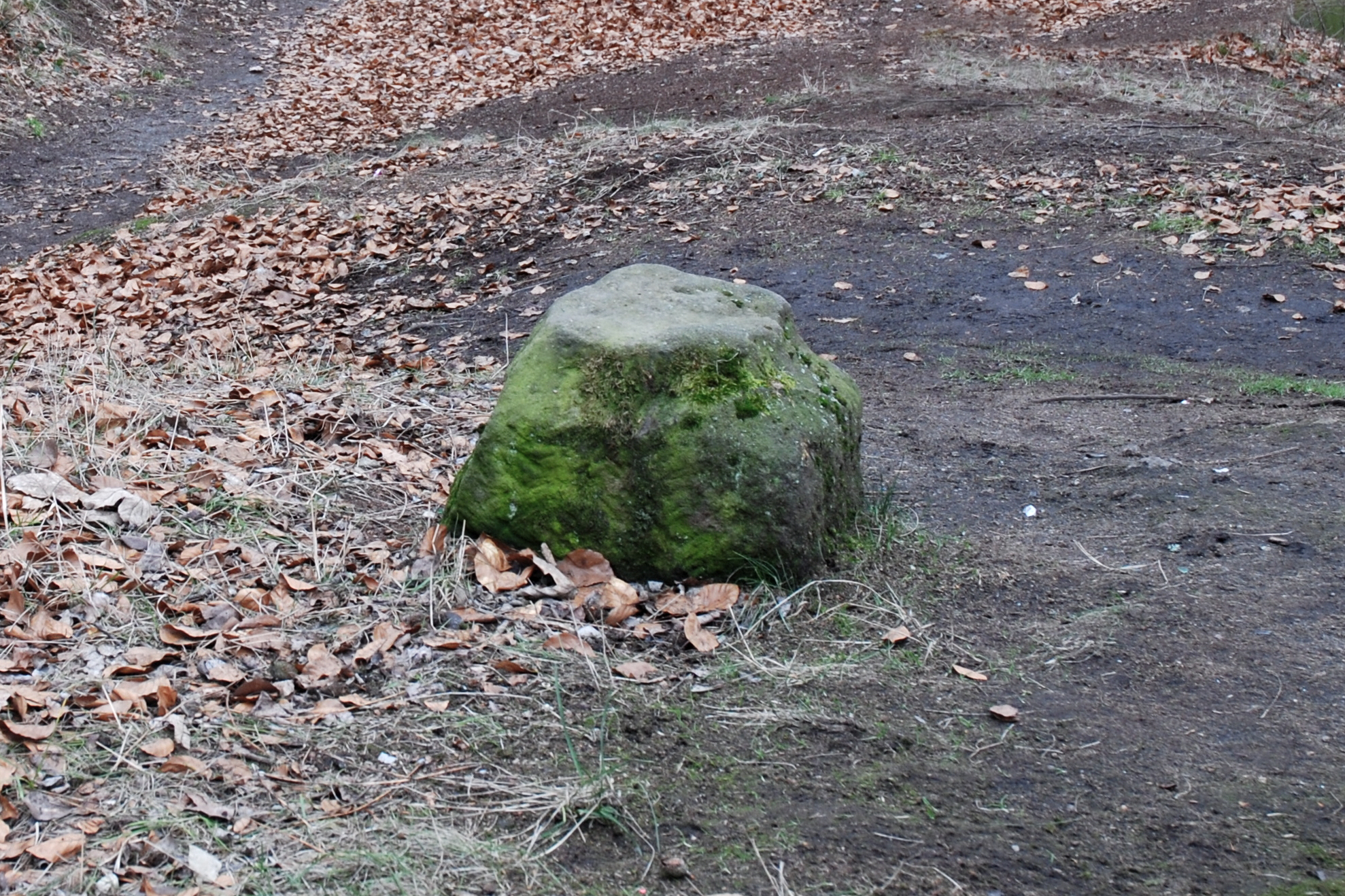 Karlovy Vary Drahovice, torzo původního smírčího kříže